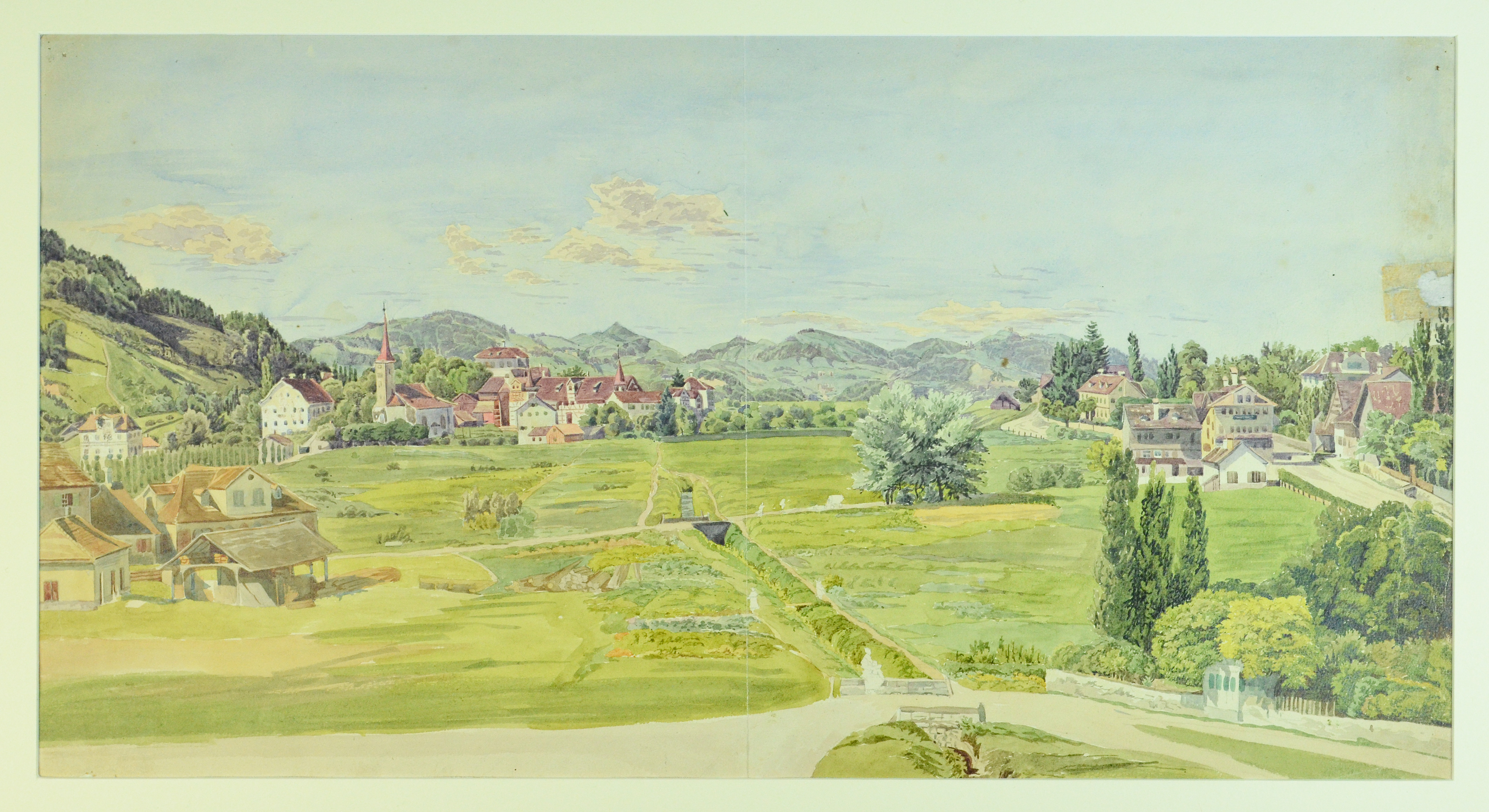 Aquarell von Elisabeth Kelly (1825-1890) Standort der Malerin ca. Rosenbergstrasse 59, St.Gallen